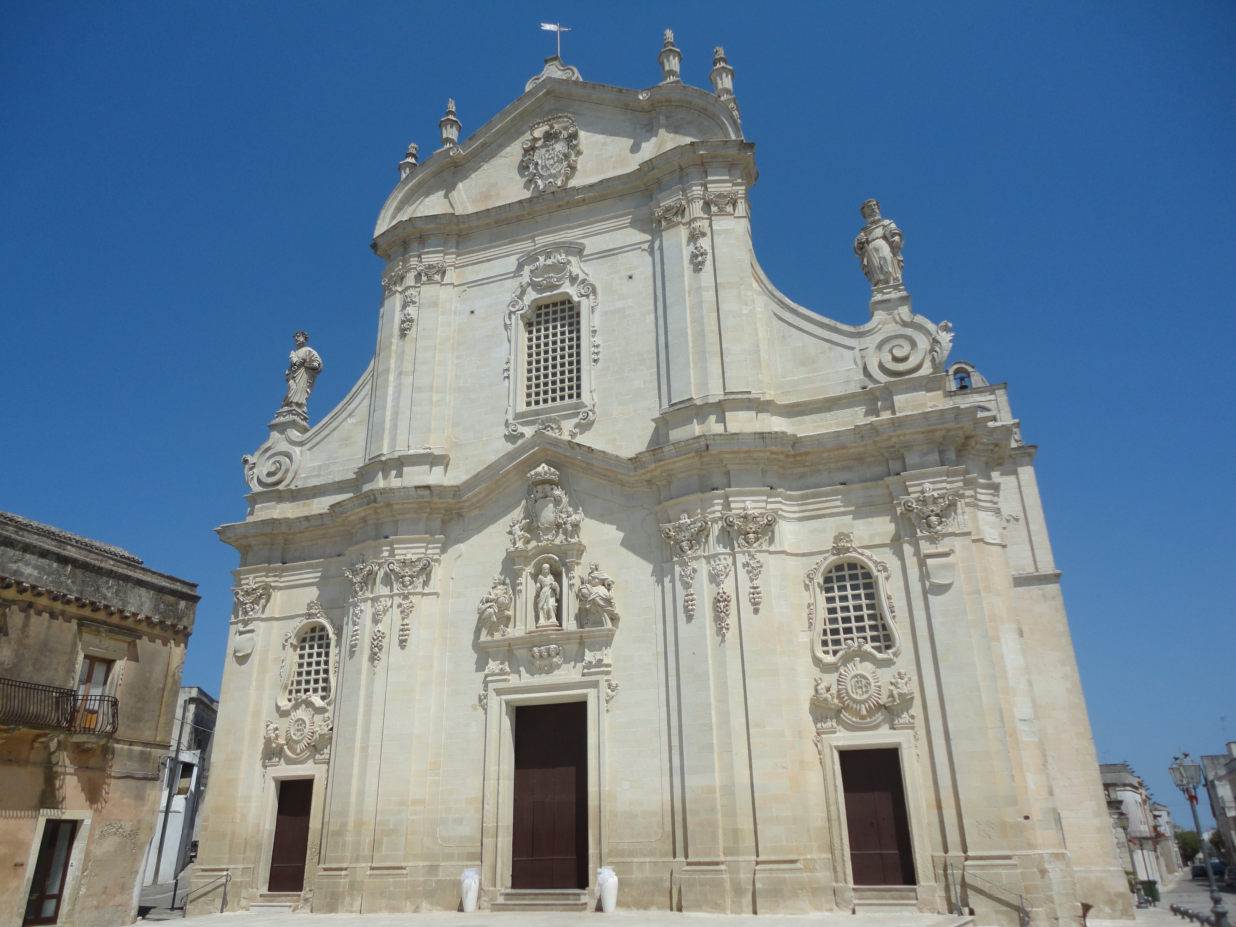 Facciata Chiesa di Uggiano la Chiesa, Lecce